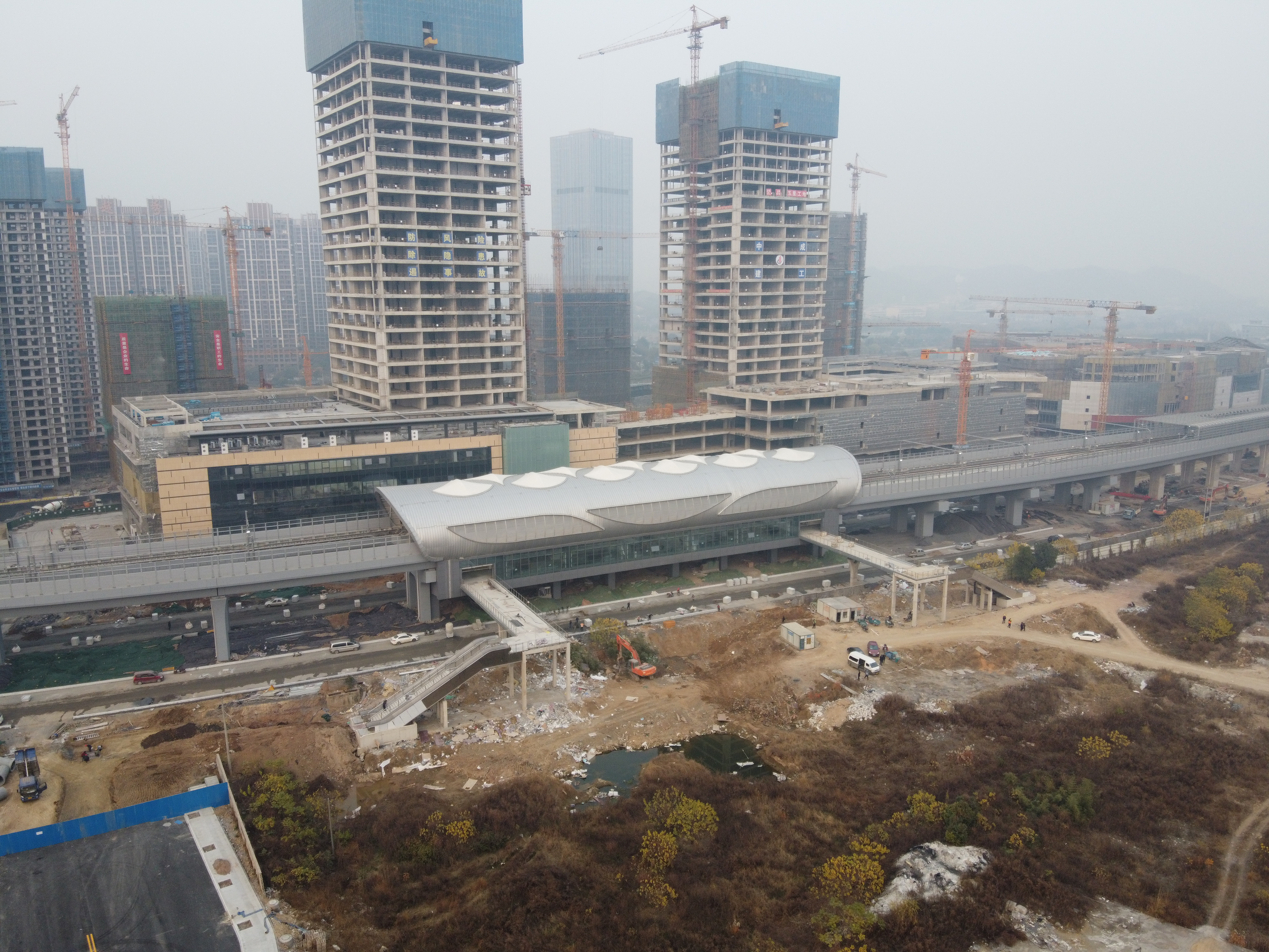 青山湖科技城站站房